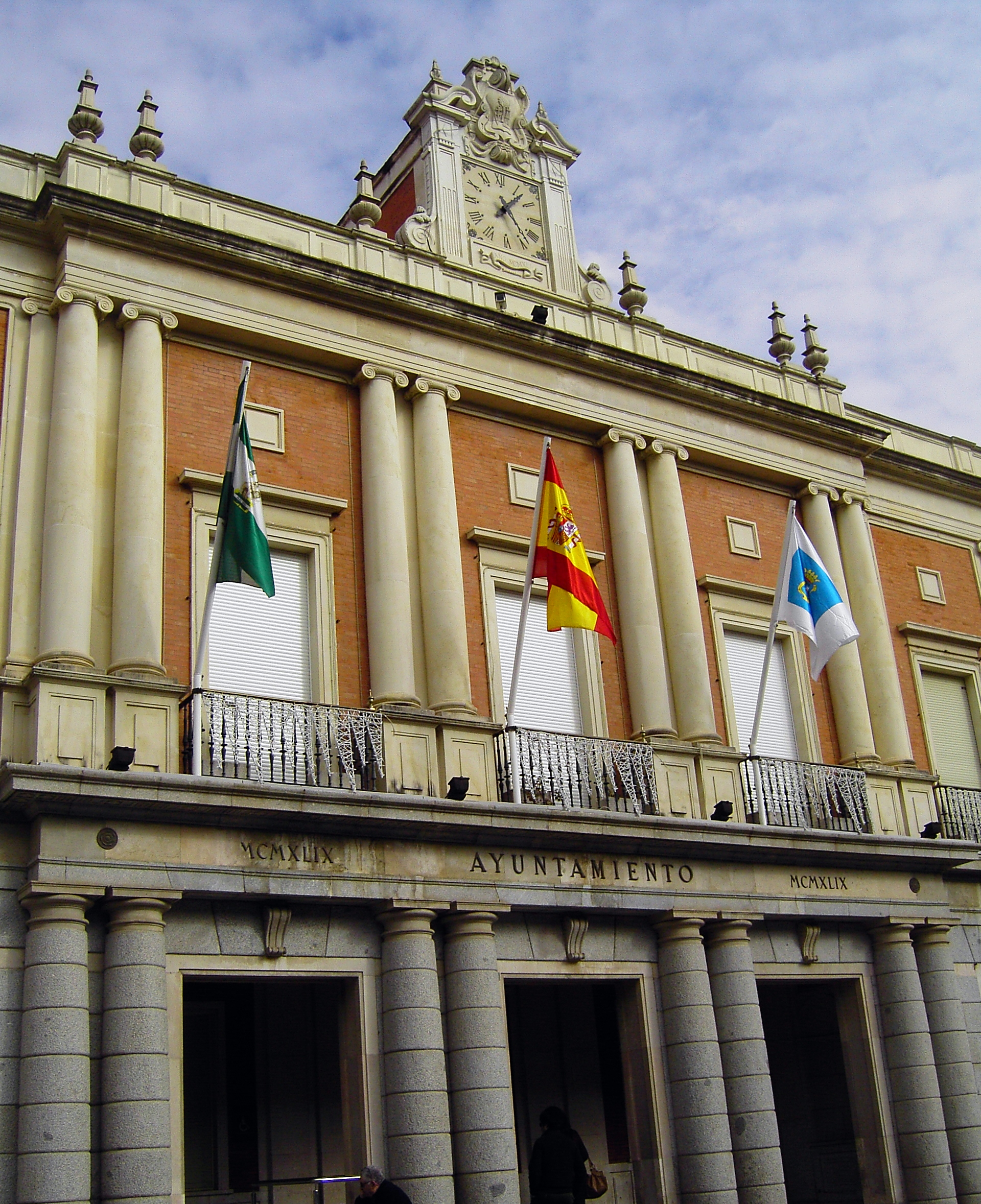 Ayuntamiento de Huelva (España)